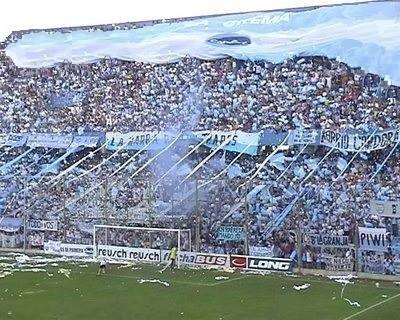 Hinchada y telón Atletico Rafaela